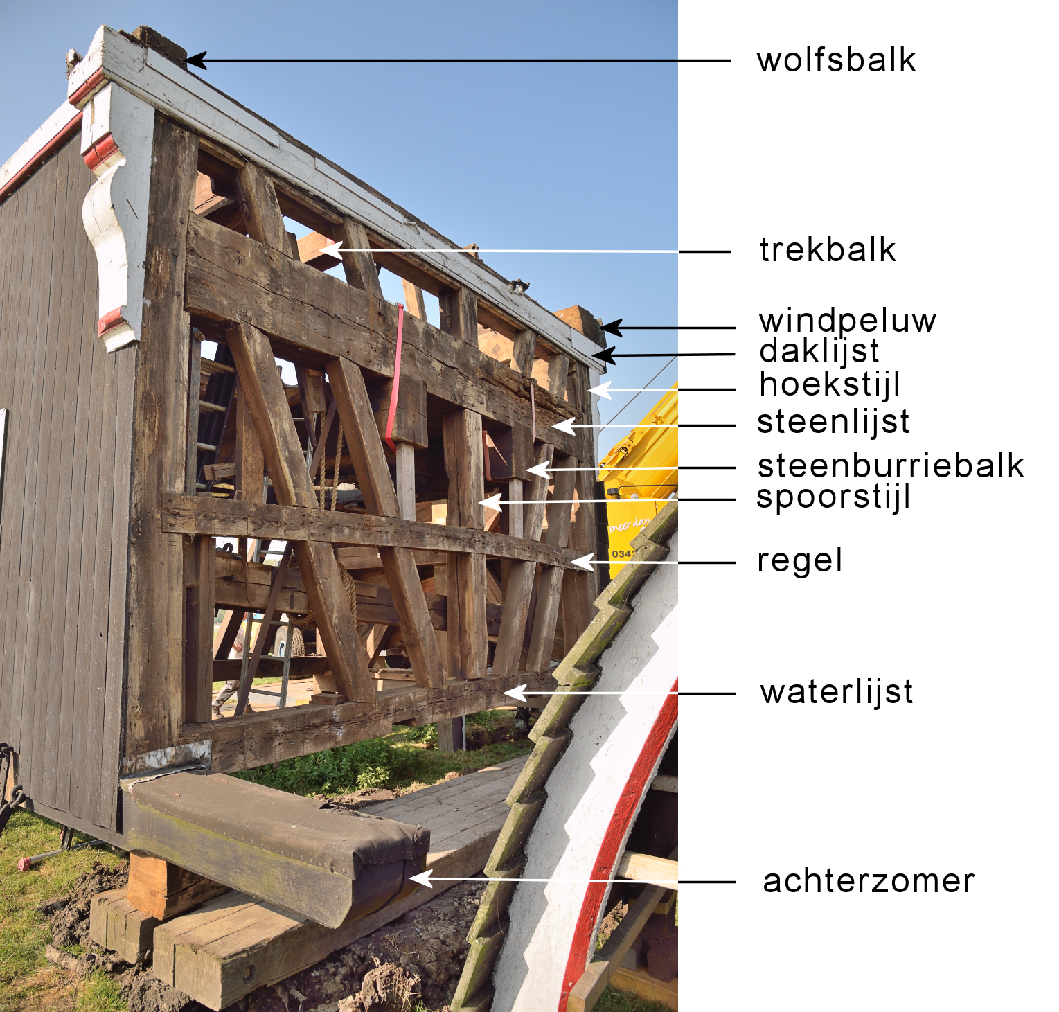 Laaglandse Molen, bovenhuis met tekst